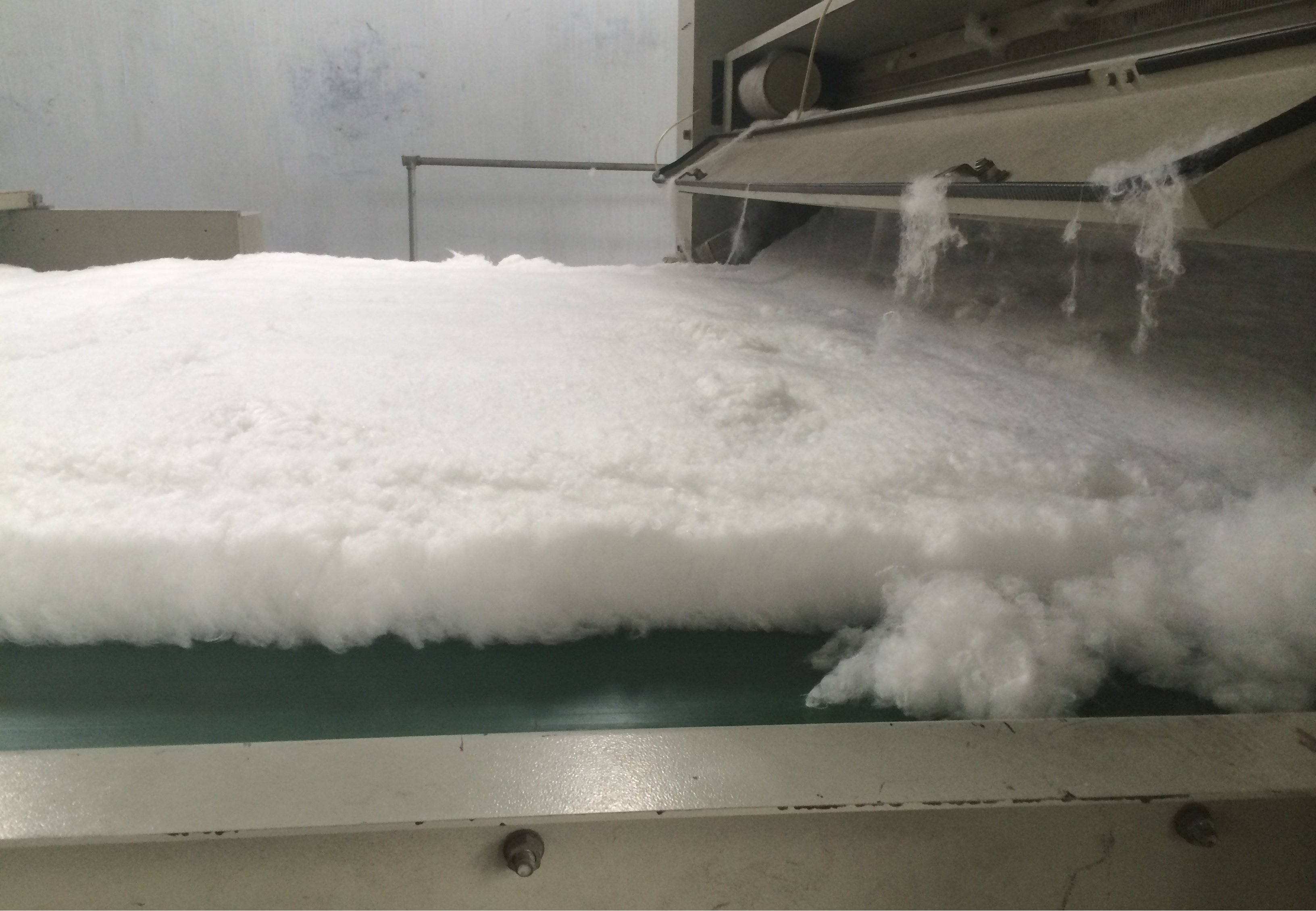 Fiocco di fibra prima dell'agugliatura